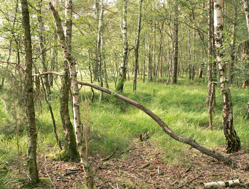 Vogelmoor